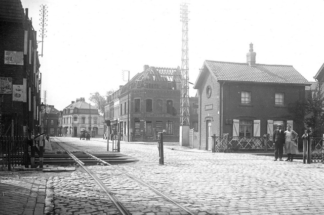 Photographie de la gare d'Houplines prise le 10 août 1927.